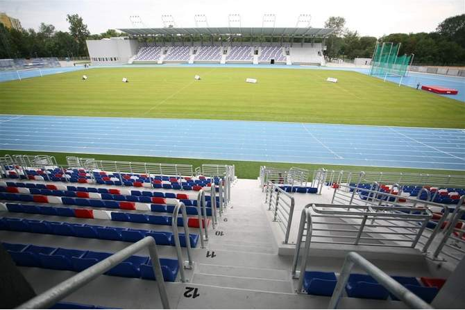 Stadion Miejski w Radomia, stadion piłkarsko-lekkoatletyczny